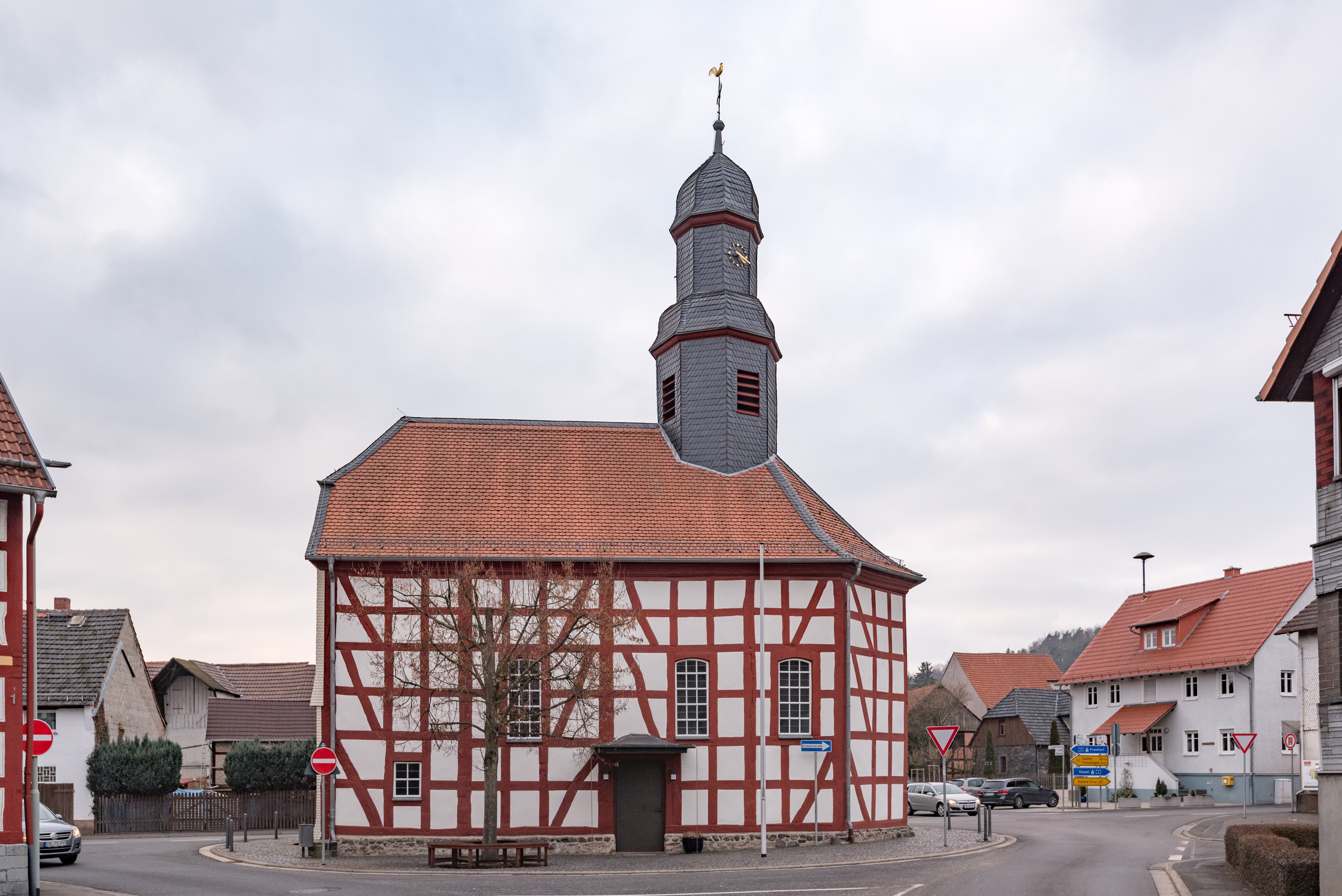 Mücke, Ruppertenrod, Unterdorf 2, Kirche